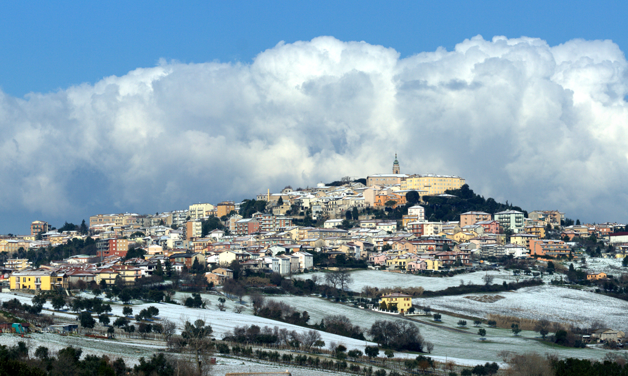 Neve a Camerano, provincia di Ancona, Italy.